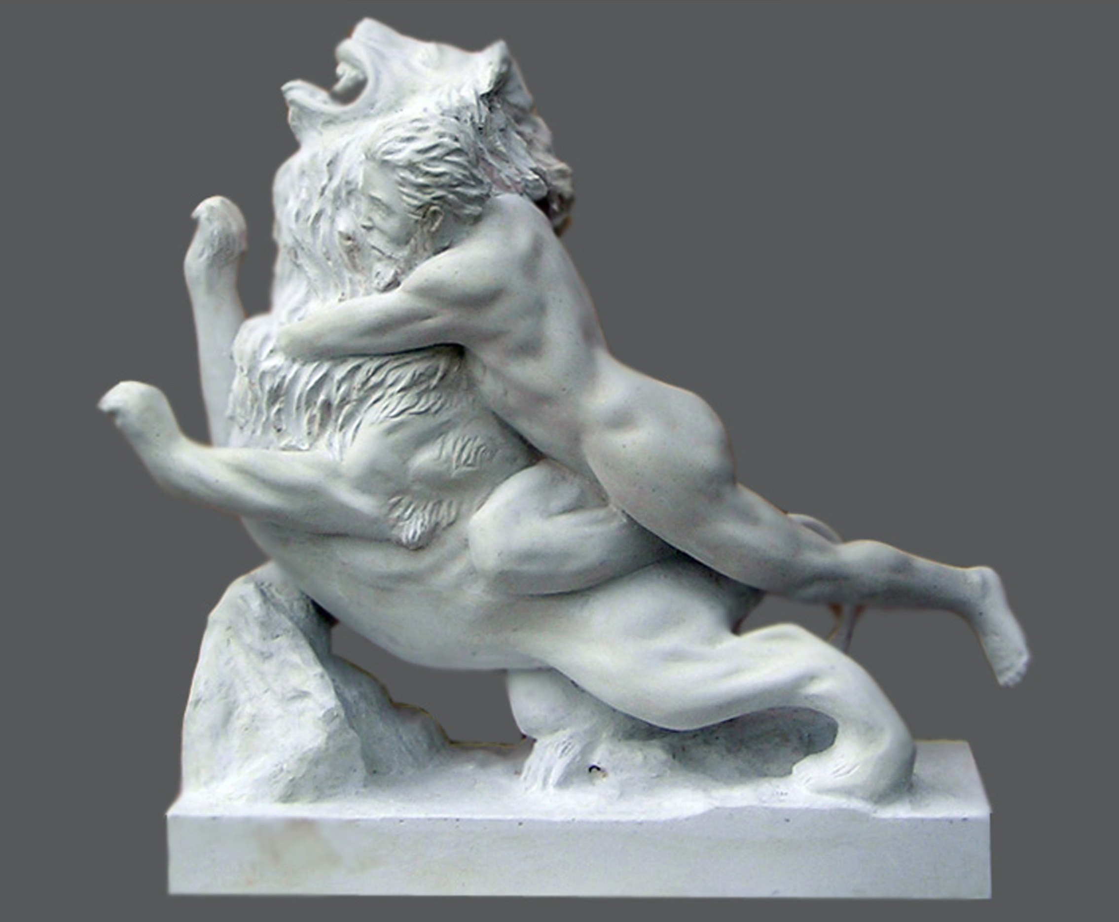 estatuilla de, aproximadamente,70 por 65 por 30 cm. realizada por J. M. Félix Magdalena en mármol artificial, representa la lucha de Heracles con el león de Nemea